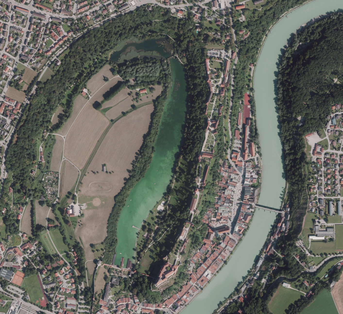 Orthophoto von Wöhrsee, Burg zu Burghausen und Salzach.